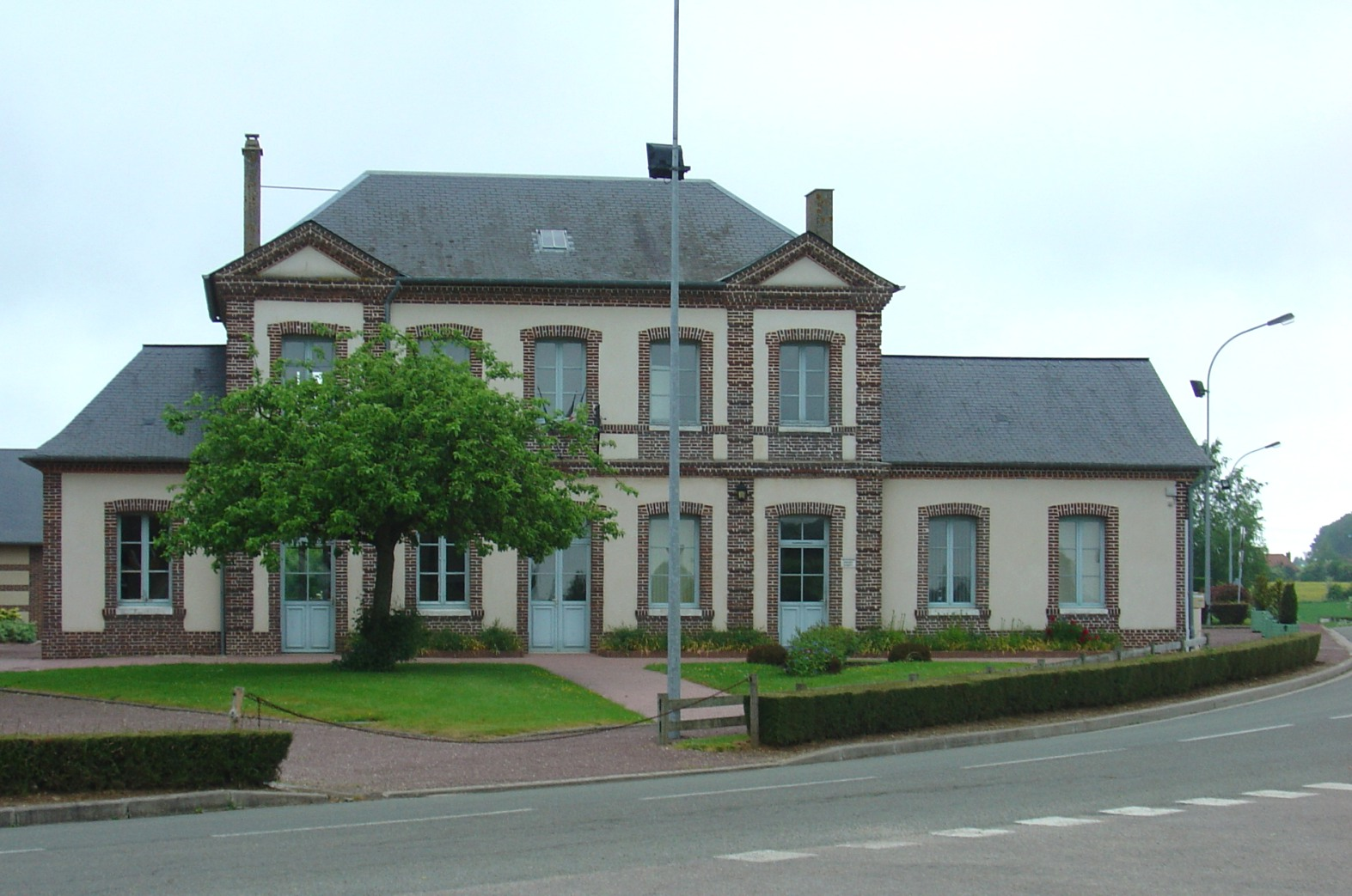 La mairie du village